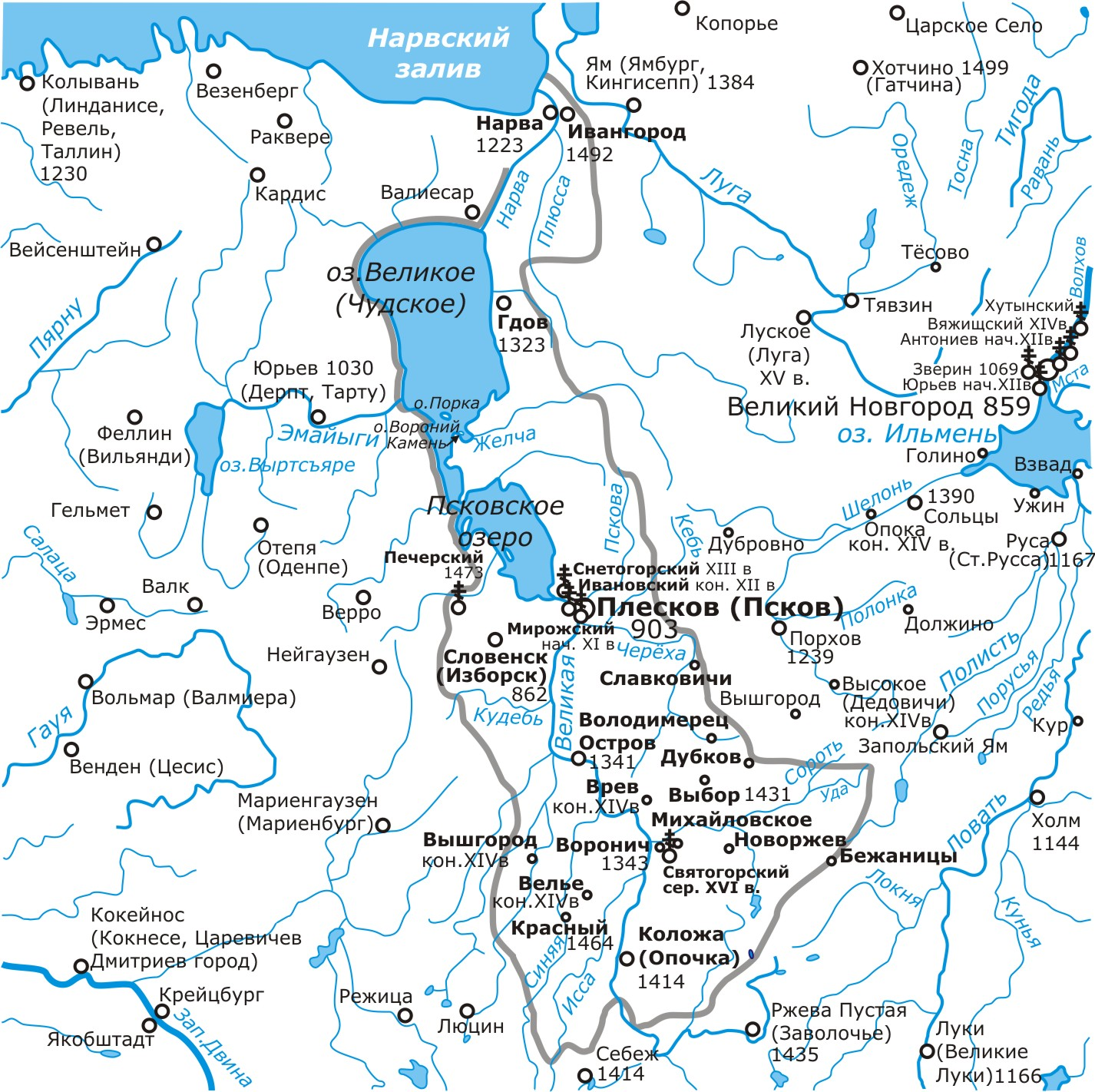 Карта Псковской земли в границах к 1462 году